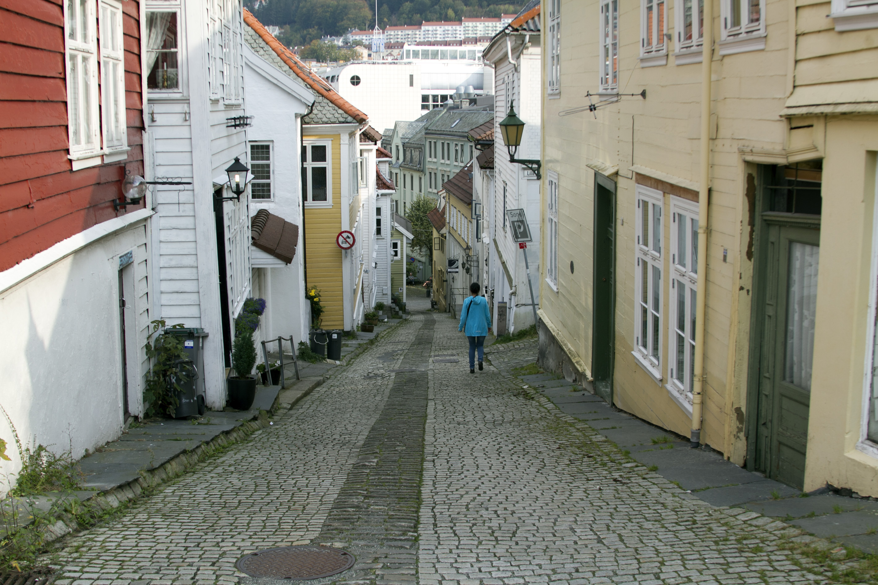 Cort Piilsmauet